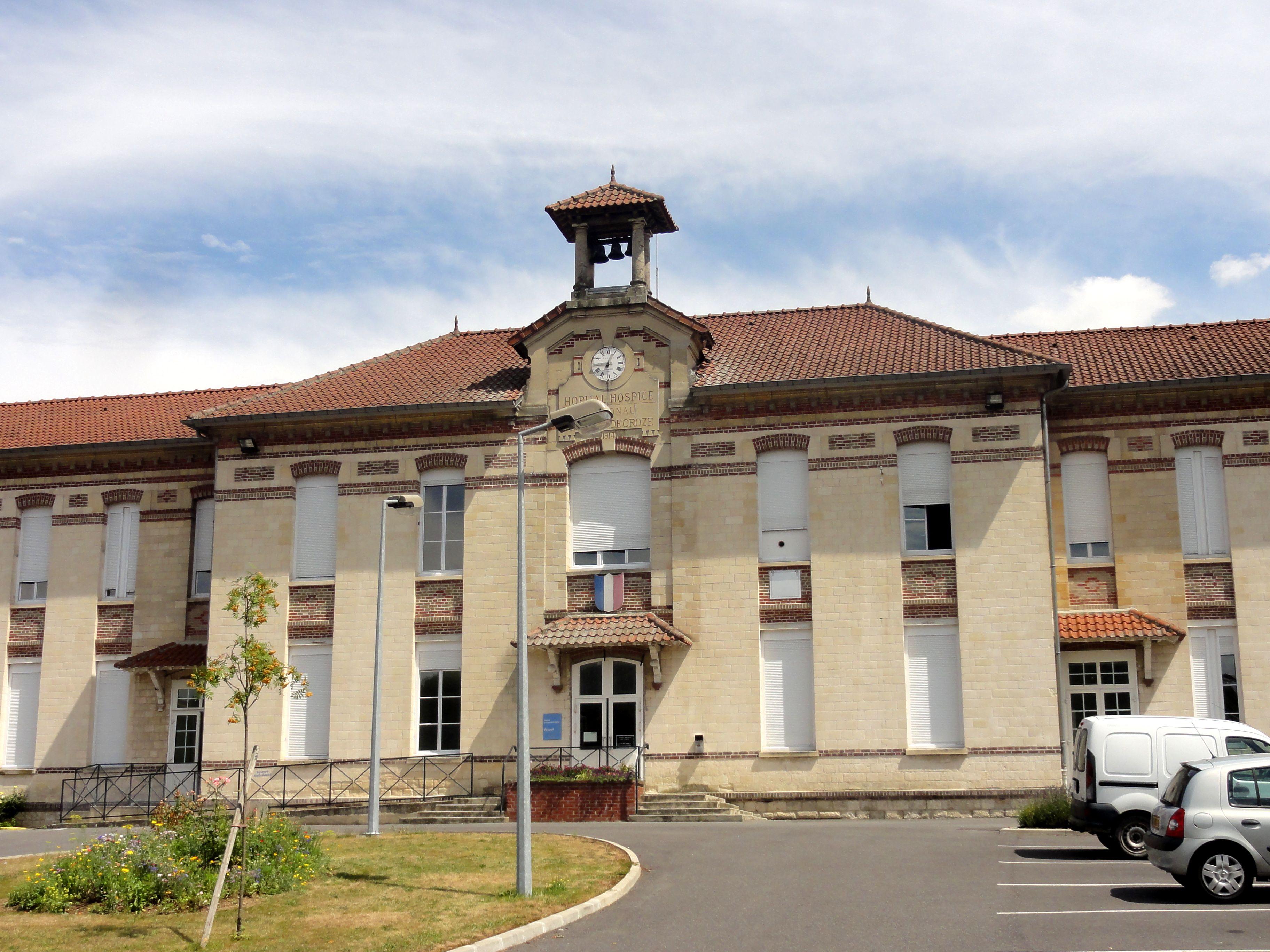 Hôpital / hospice régional Georges-Decroze.